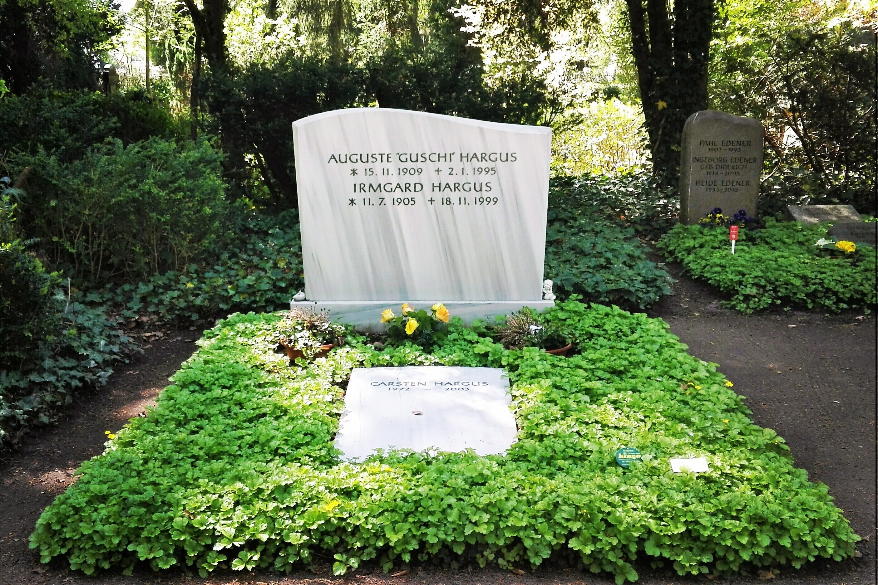 Auguste „Guschi“ Hargus (* 15. November 1909 in Lübeck; † 2. Januar 1995 ebenda), erfolgreiche deutsche Athletin und zeitweilige Weltrekordhalterin im Speerwurf.